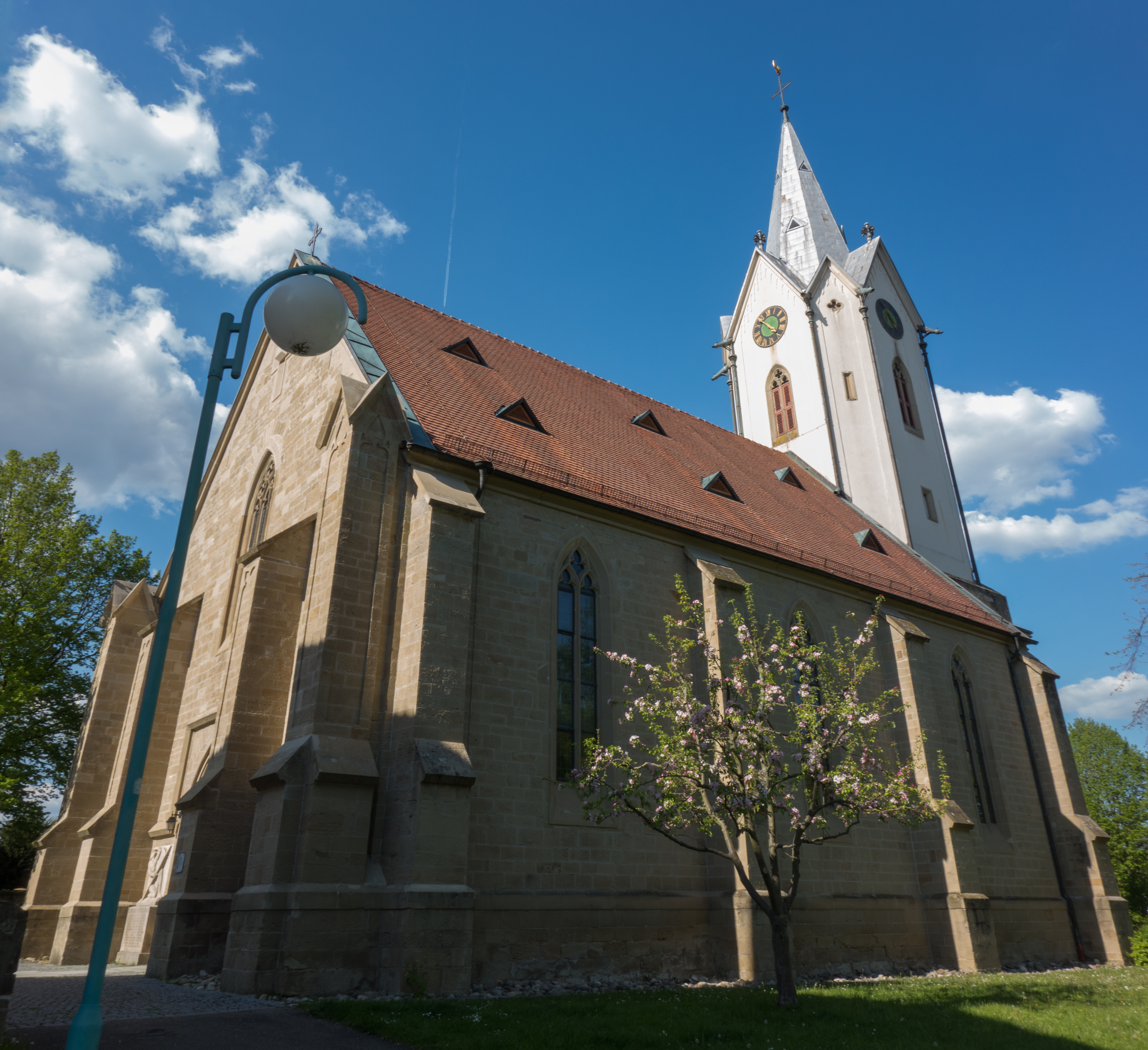 Ev. Pfarrkirche in Rommelshausen.